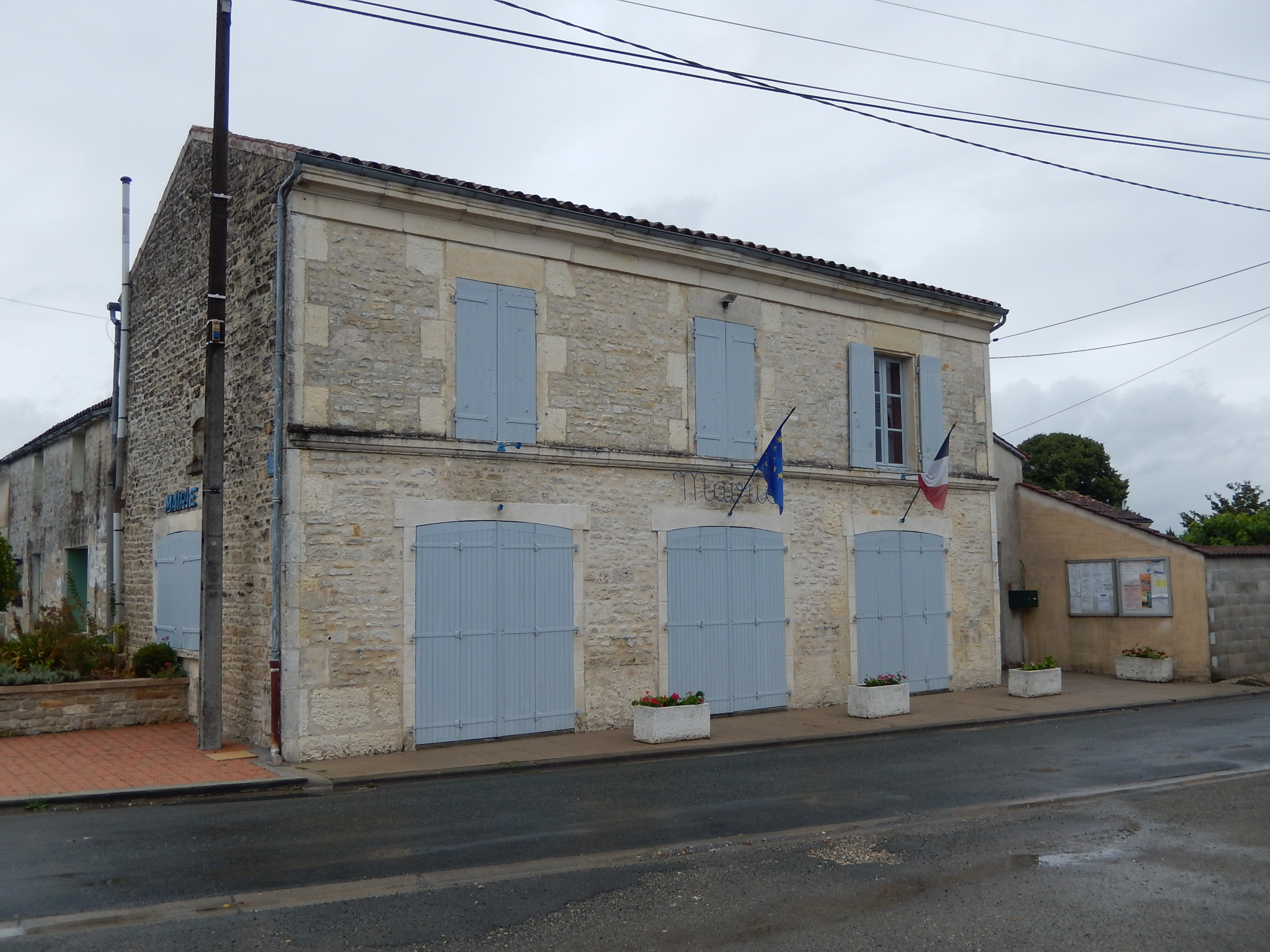 La mairie de la commune d'Aujac, en Charente-Maritime.